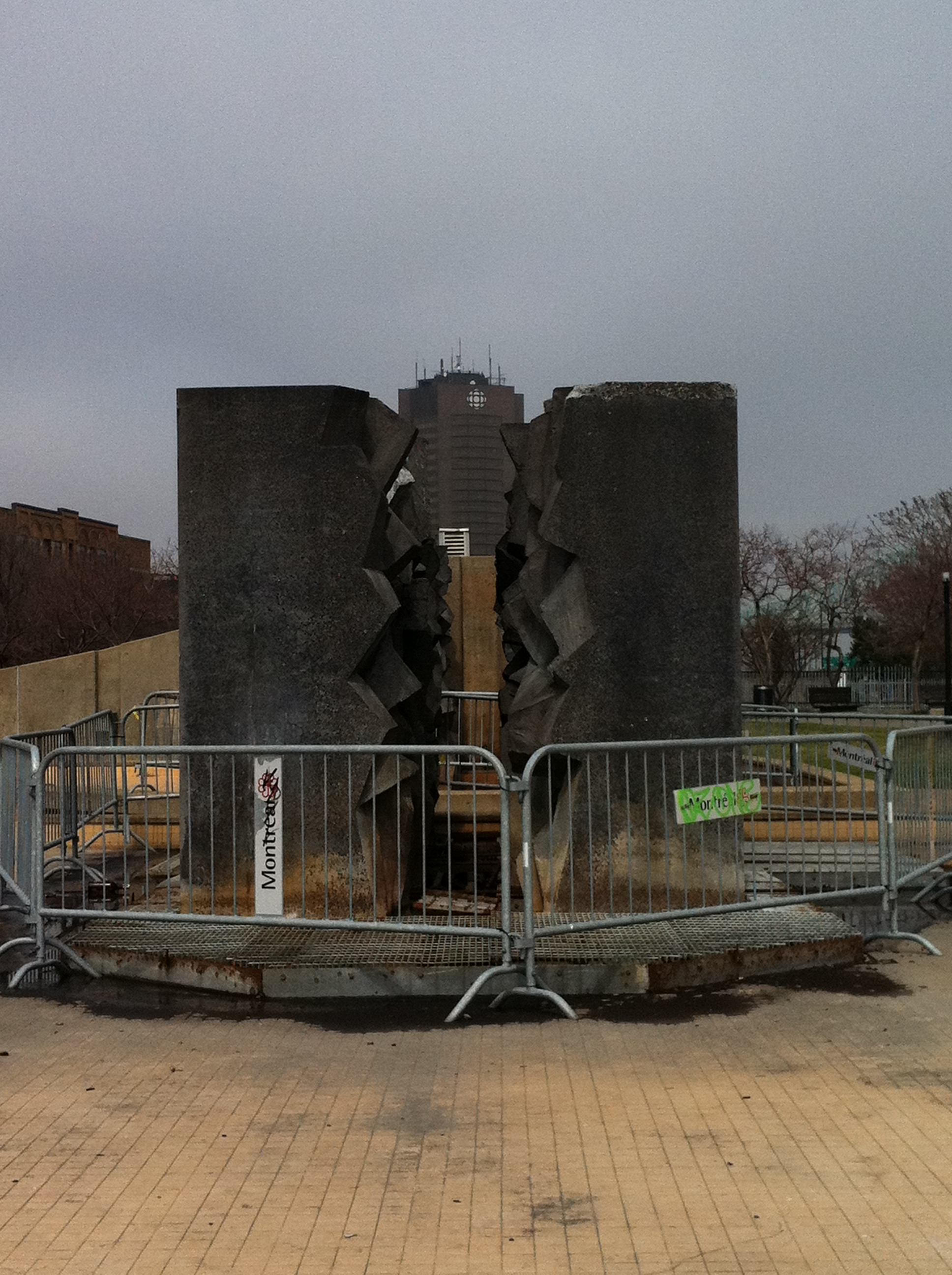 Cette fontaine, conçue par Claude Théberge, fut installé au square dans les années 1980. On voit la tour de Radio-Canada au loin, entre les blocs de la fontaine.